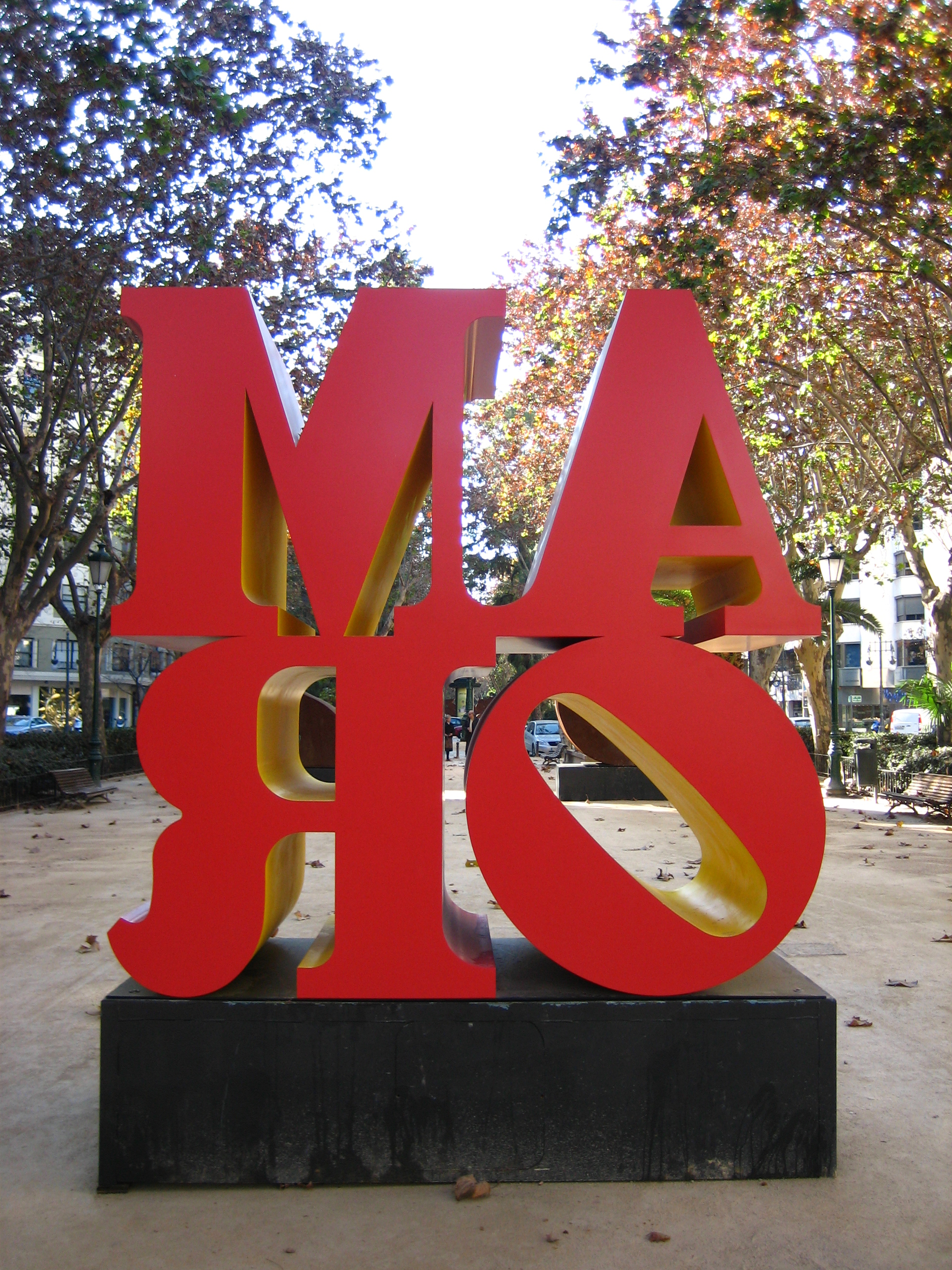 Robert Indiana. "Por amor al arte". Valencia, 8 enero 2007 - 25 febrero 2007.